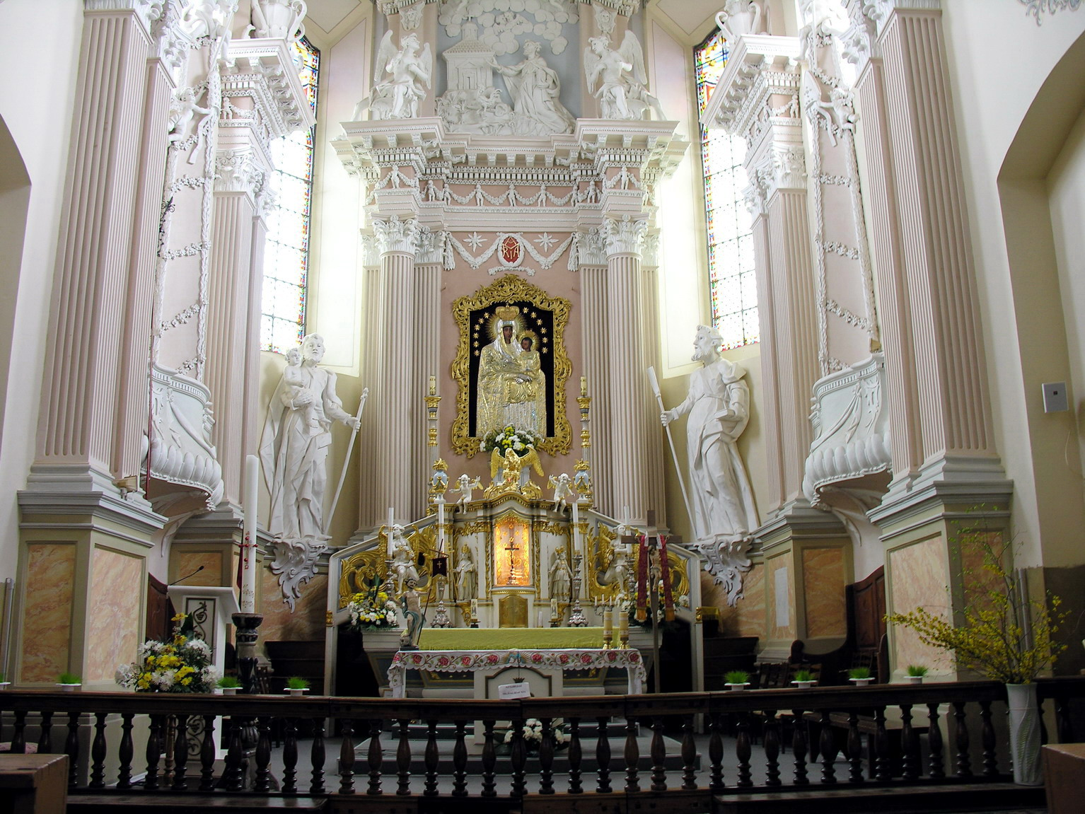 Šiluvos Švč. Mergelės Marijos Gimimo bazilika 2007 m. balandžio 21 d., Lietuva